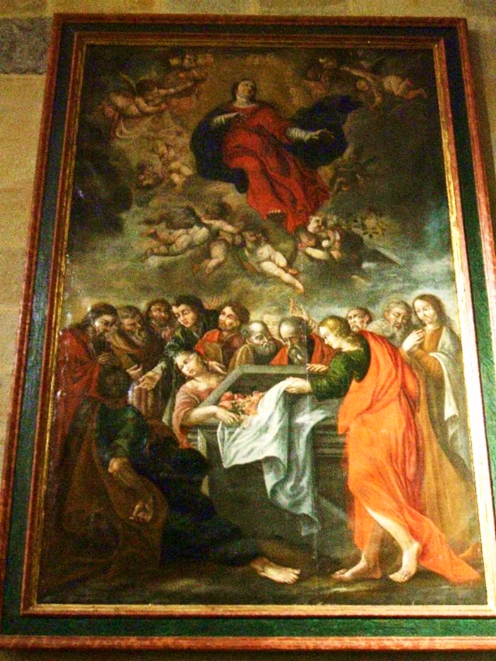 Cuadro "La Asunción de la Virgen", iglesia de San Antón, Bilbao